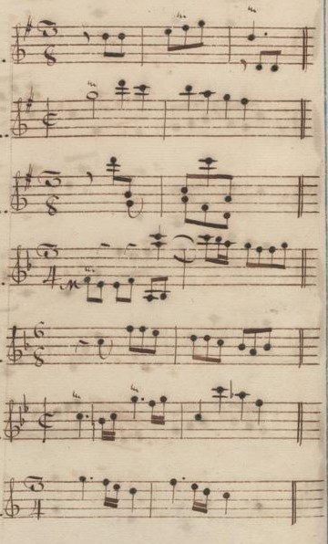 Table du volume XIII des manuscrits de Venise (incipit des sonates 8 à 14, K. 521 à 527).